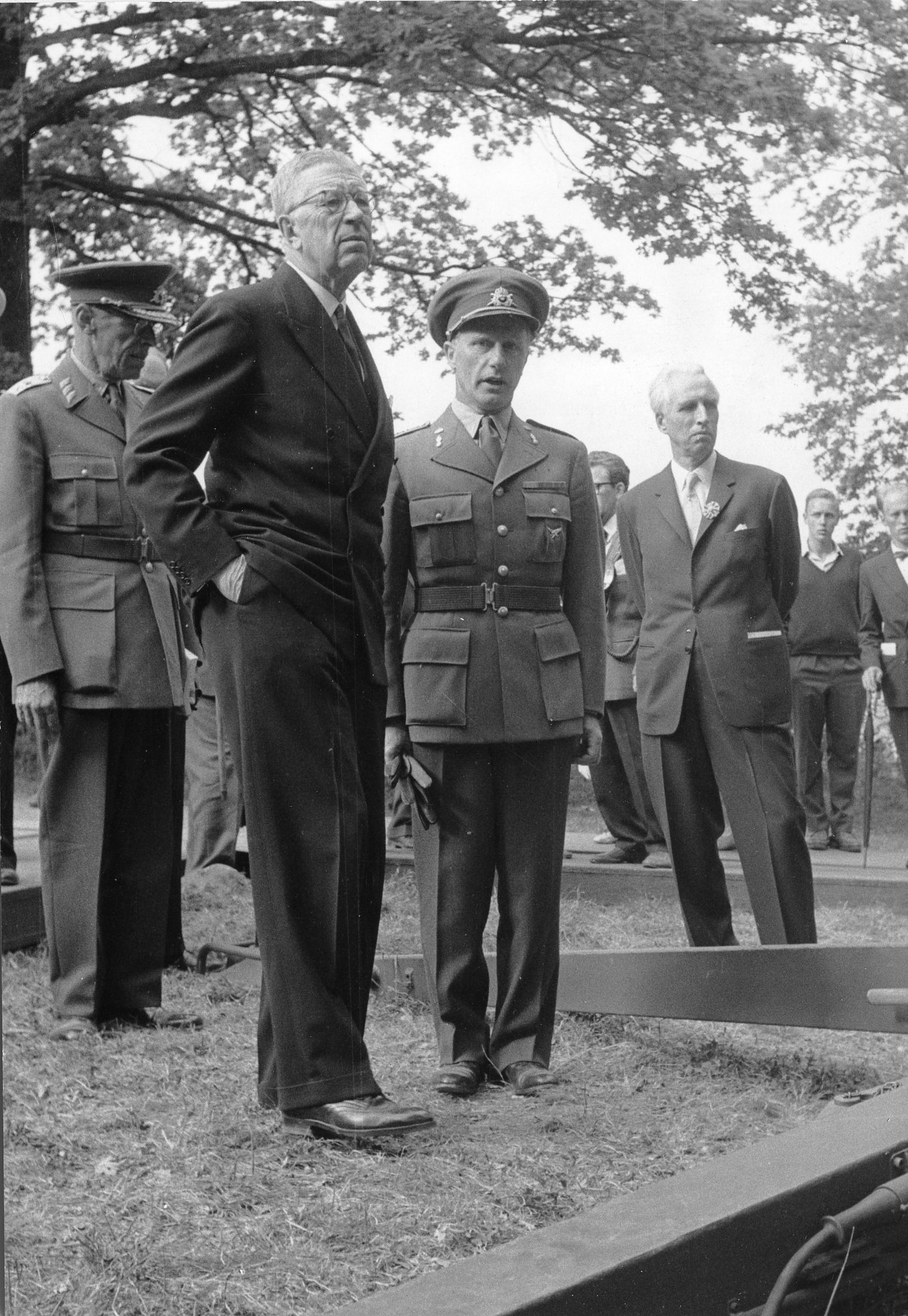 Kung Gustaf VI Adolf besöker Jönköping 1959. På bilden bredvid Kungen syns Landshövding Allan Nordenstam, Överstelöjtnant N.I. Carlborg, samt Generalmajor Viking Tamm.